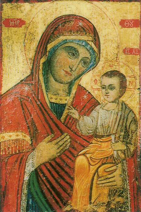 Икона на Успение Богородично от Панормо (Бандърма), донесена в 1922 година в Биджова махала